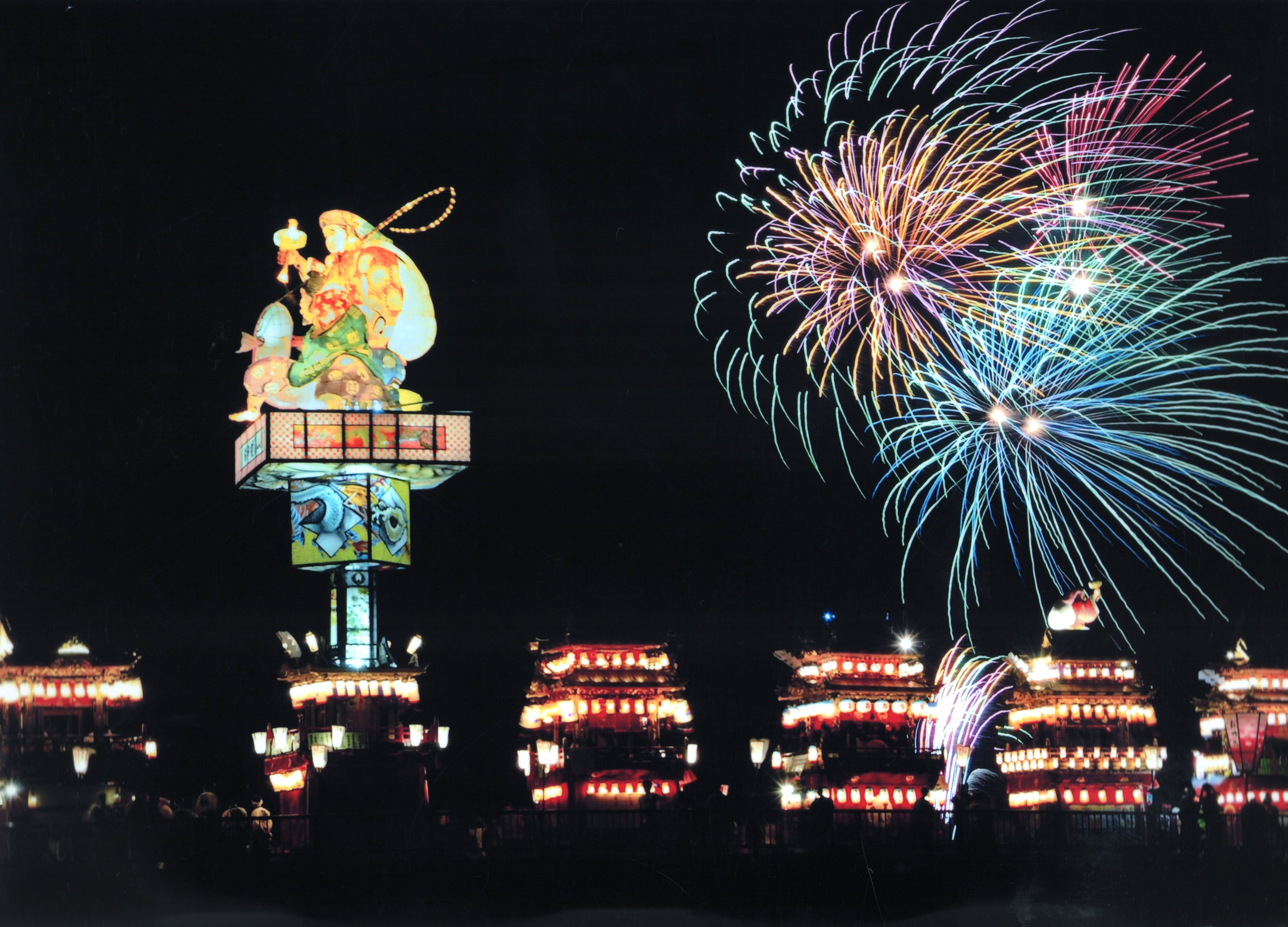 石川県珠洲市飯田町で7月20日・21日に開催される祭りです。詳細はwebで